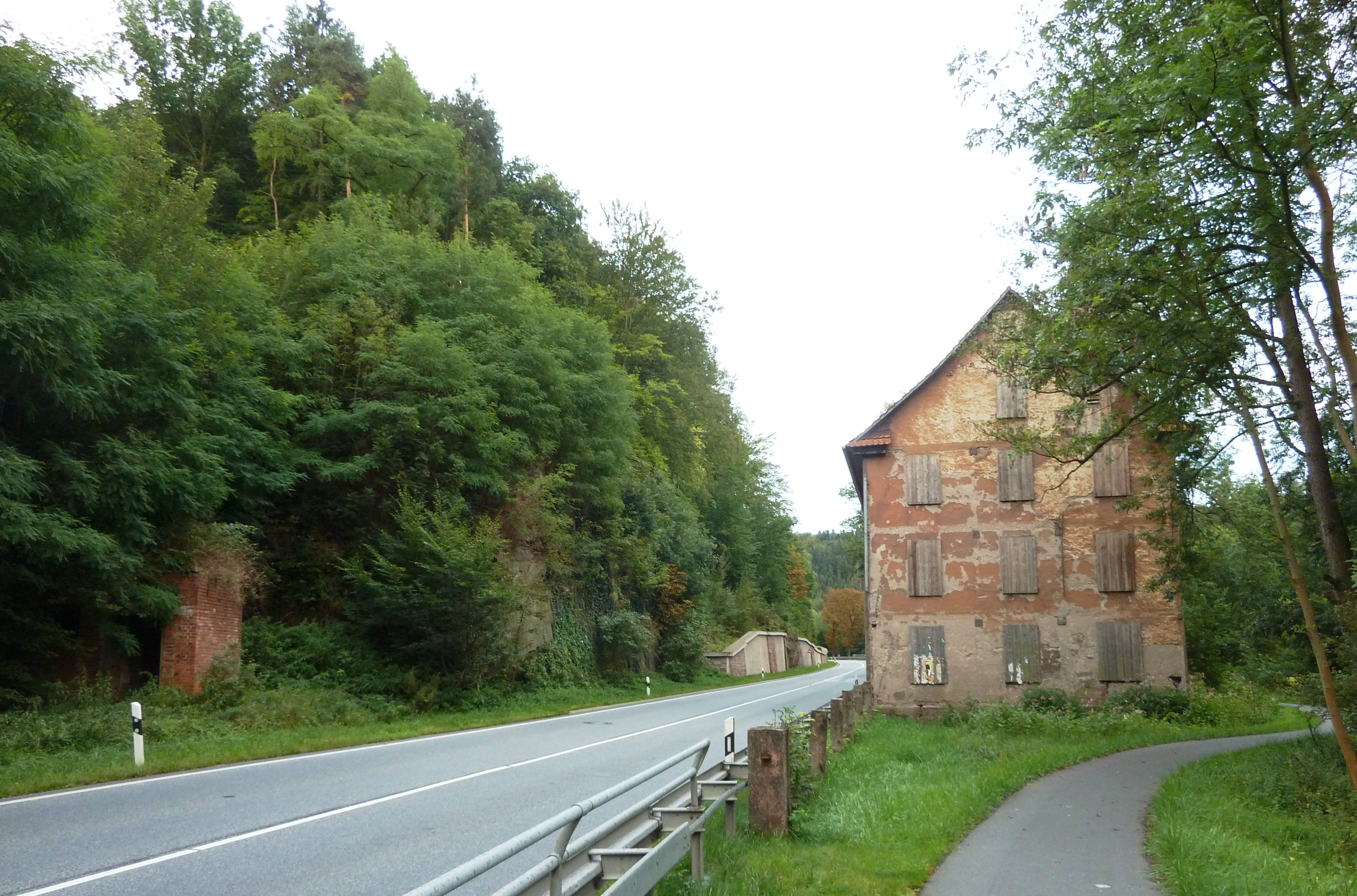 Nordansicht der Wiesenmühle bei Marth, Landkreis Eichsfeld. FFH-Schutzgebiet Nr. 4625-304. Links die B80, rechts der Leine-Heide-Radweg.